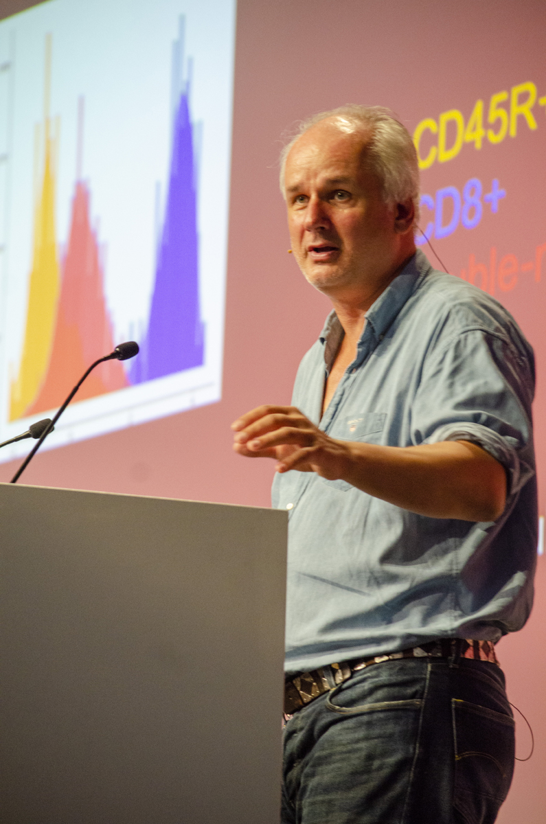 Nikolaus Rajewsky speaking at ISMB / ECCB in 2019